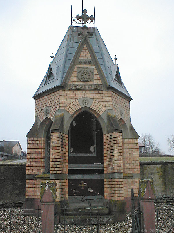 Friedhofskapelle der Freiherren von Helmstatt in Neckarbischofsheim